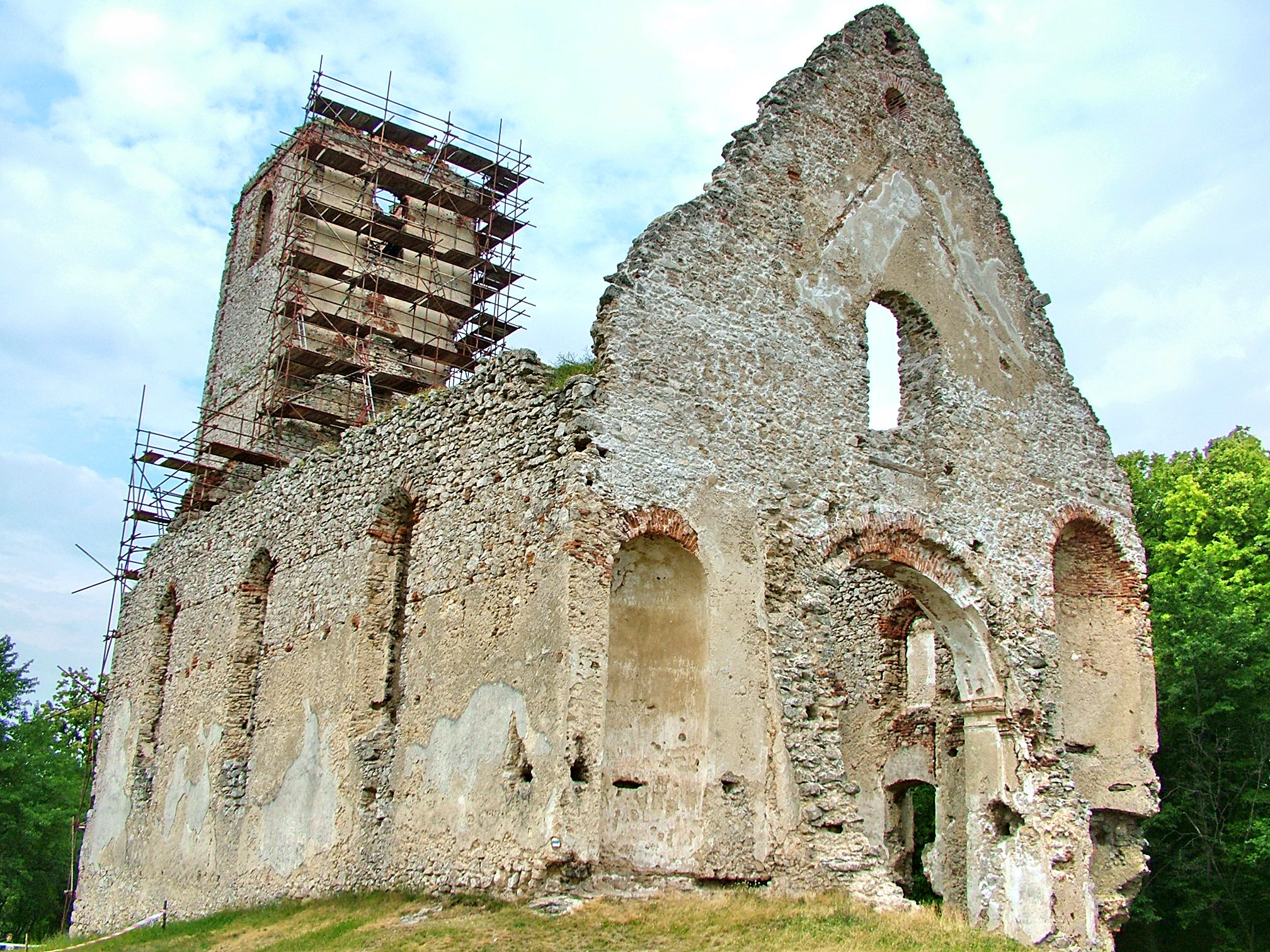 Katarínka. Zrúcanina kostola a kláštora sv. Kataríny. Začiatok letných prác na konzervácii kostolnej veže v roku 2005.